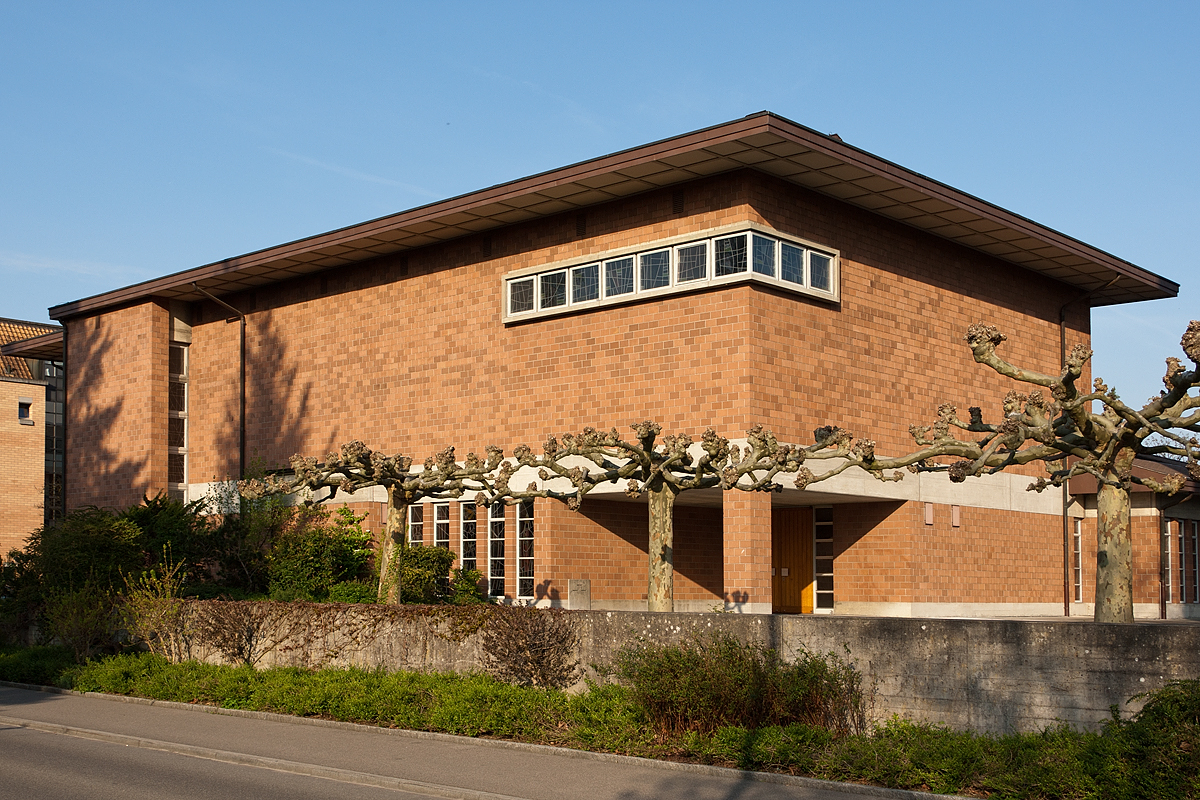 Bruder Klaus Kirche (mit freistehendem Kirchturm) in Diessenhofen (TG)